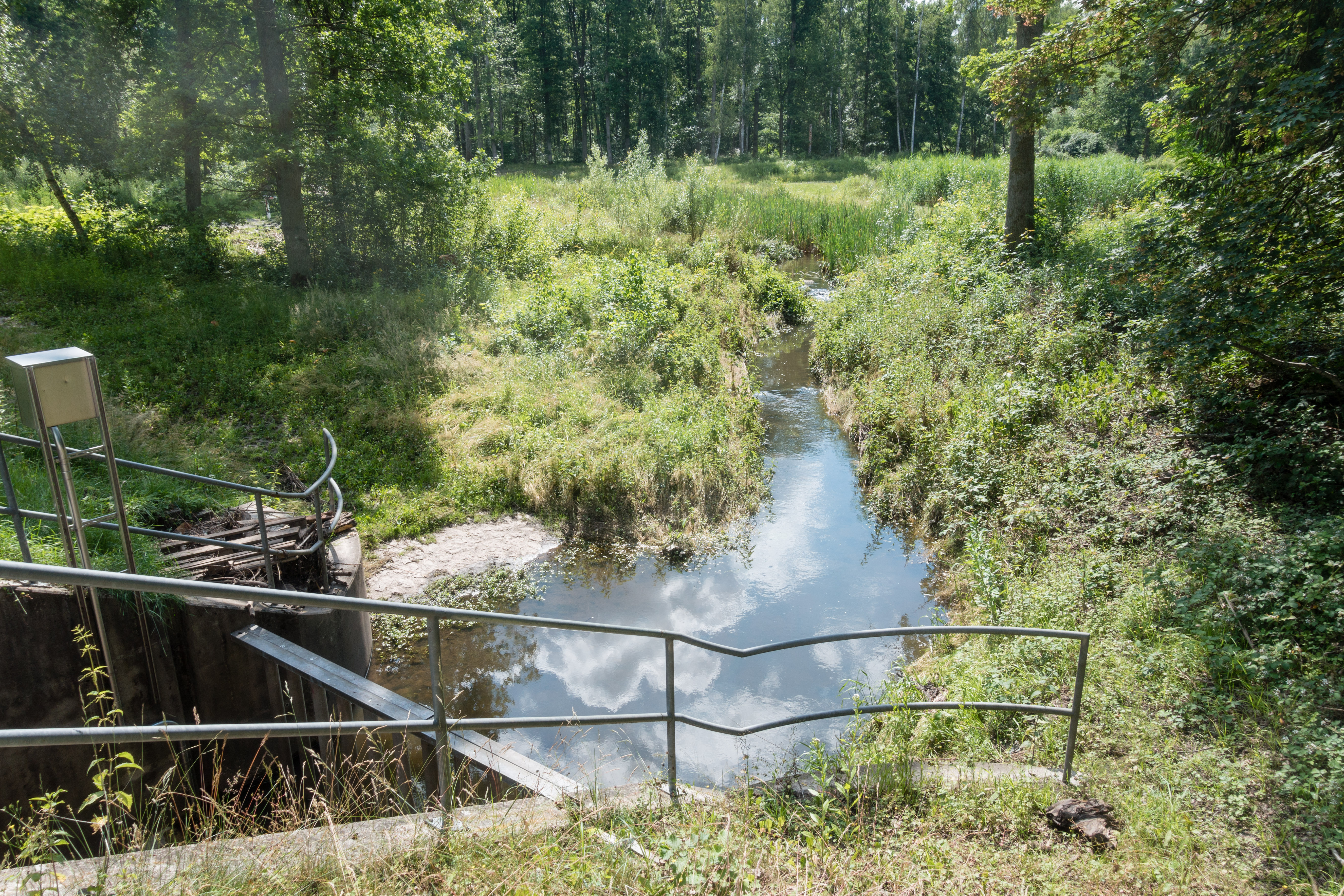 Langwasser, Bachlauf, Nürnberg, Wehr